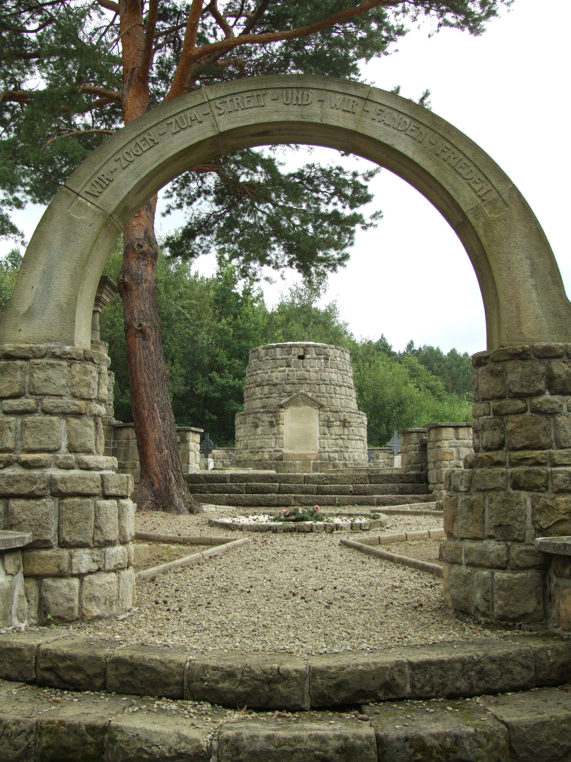 Cmentarz wojskowy nr 11